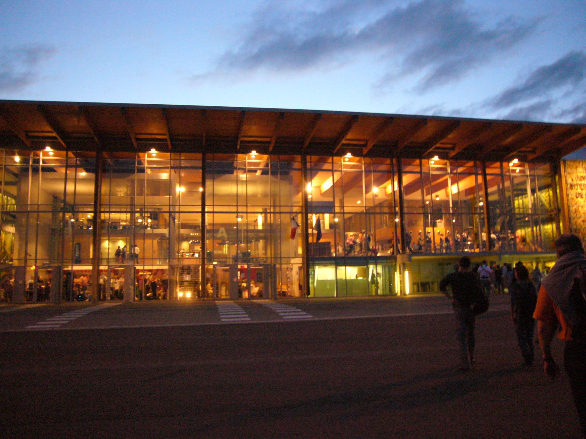 Aérogare de l'aéroport de Limoges-Bellegarde, Haute-Vienne, France